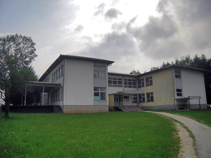 OS_Petar_Kočić_u_Stričićima